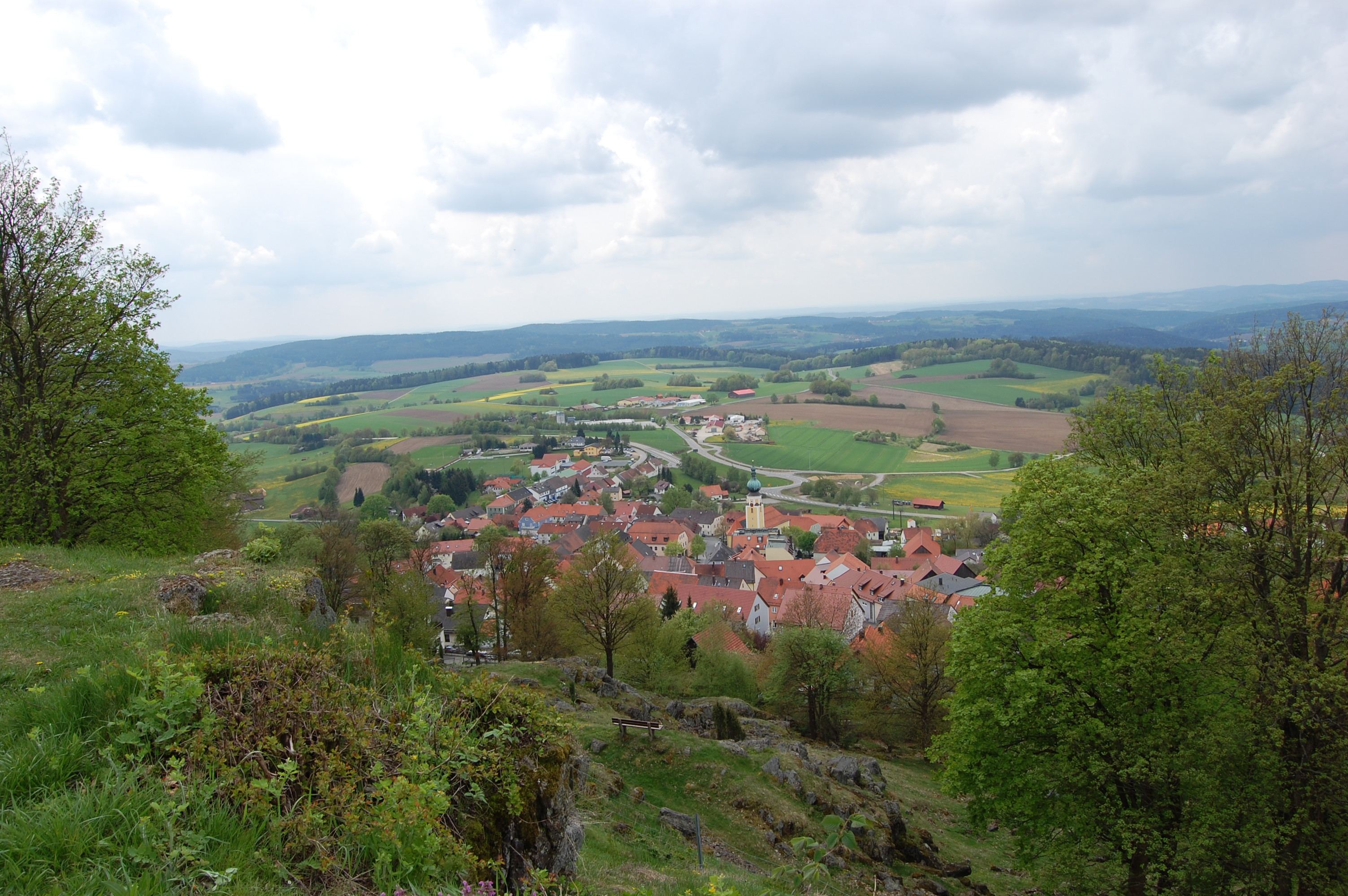 Blick vom Burgstall Tännesberg (auf dem Schlossberg) auf den Markt Tännesberg und die Hügellandschaft der mittleren Oberpfalz